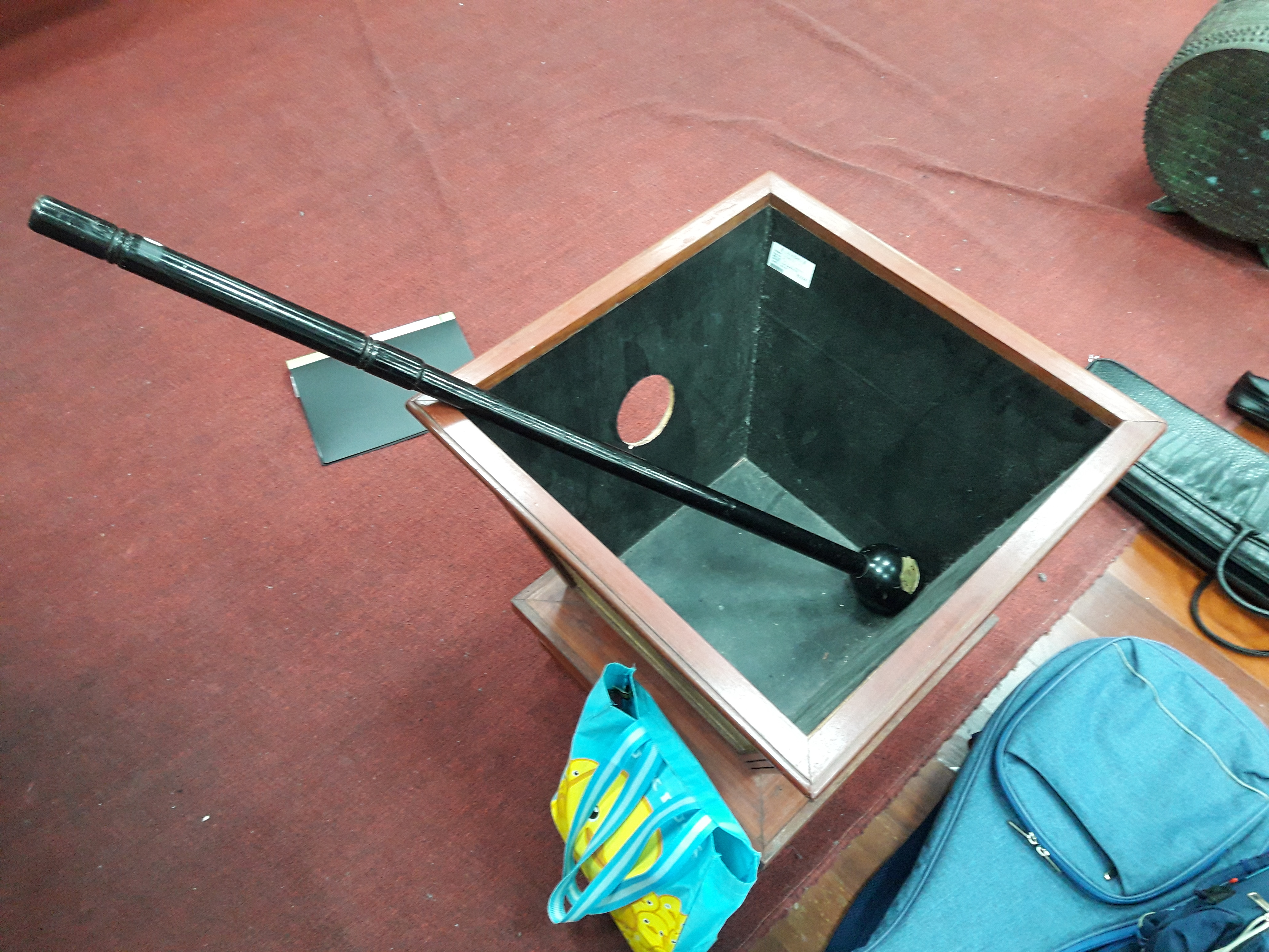 中國古代樂器「柷」，攝於臺灣國立臺南藝術大學。